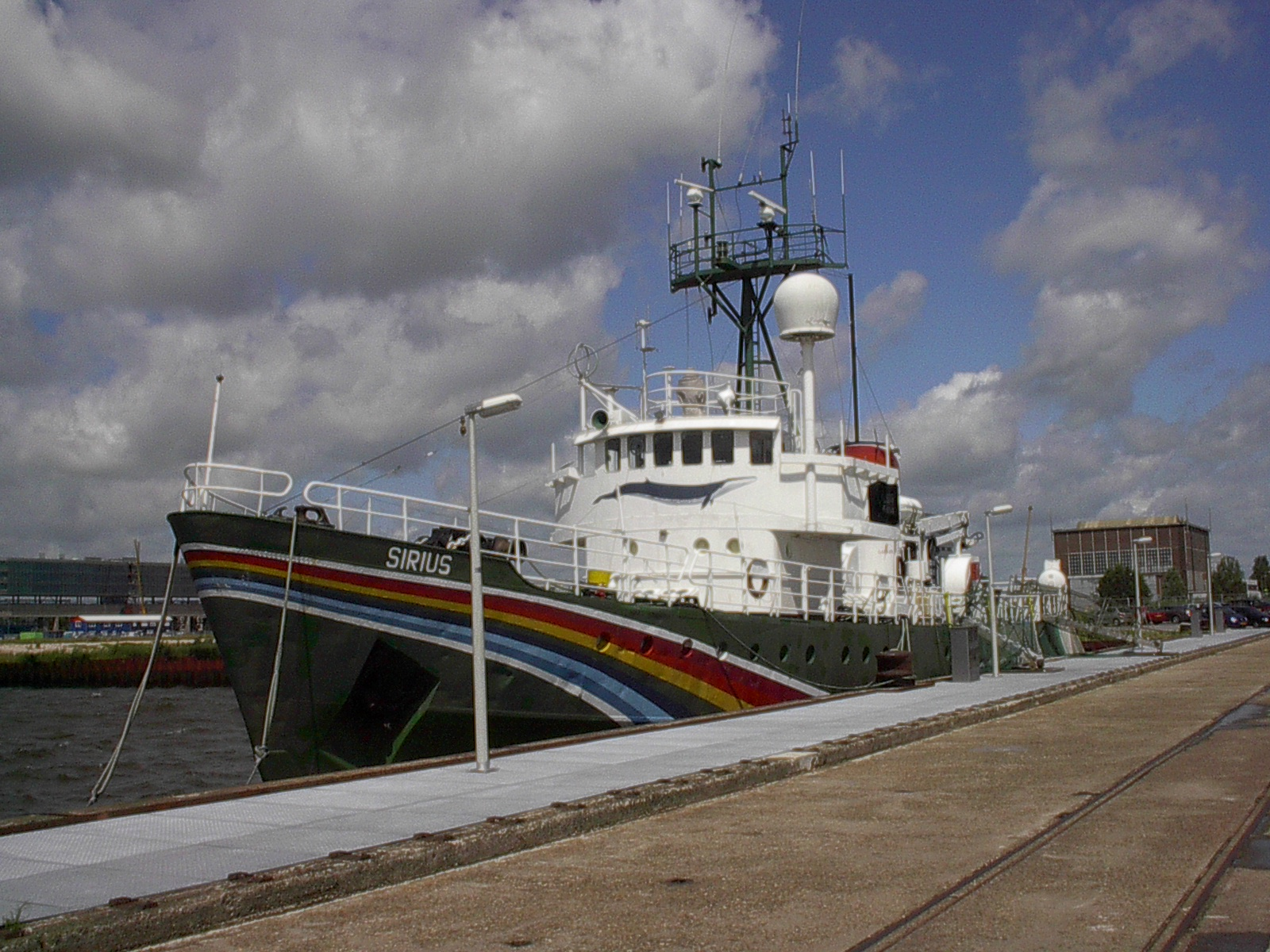 De Sirius, voormalig Greenpeace-schip, Amsterdam IMO Number: 8837461